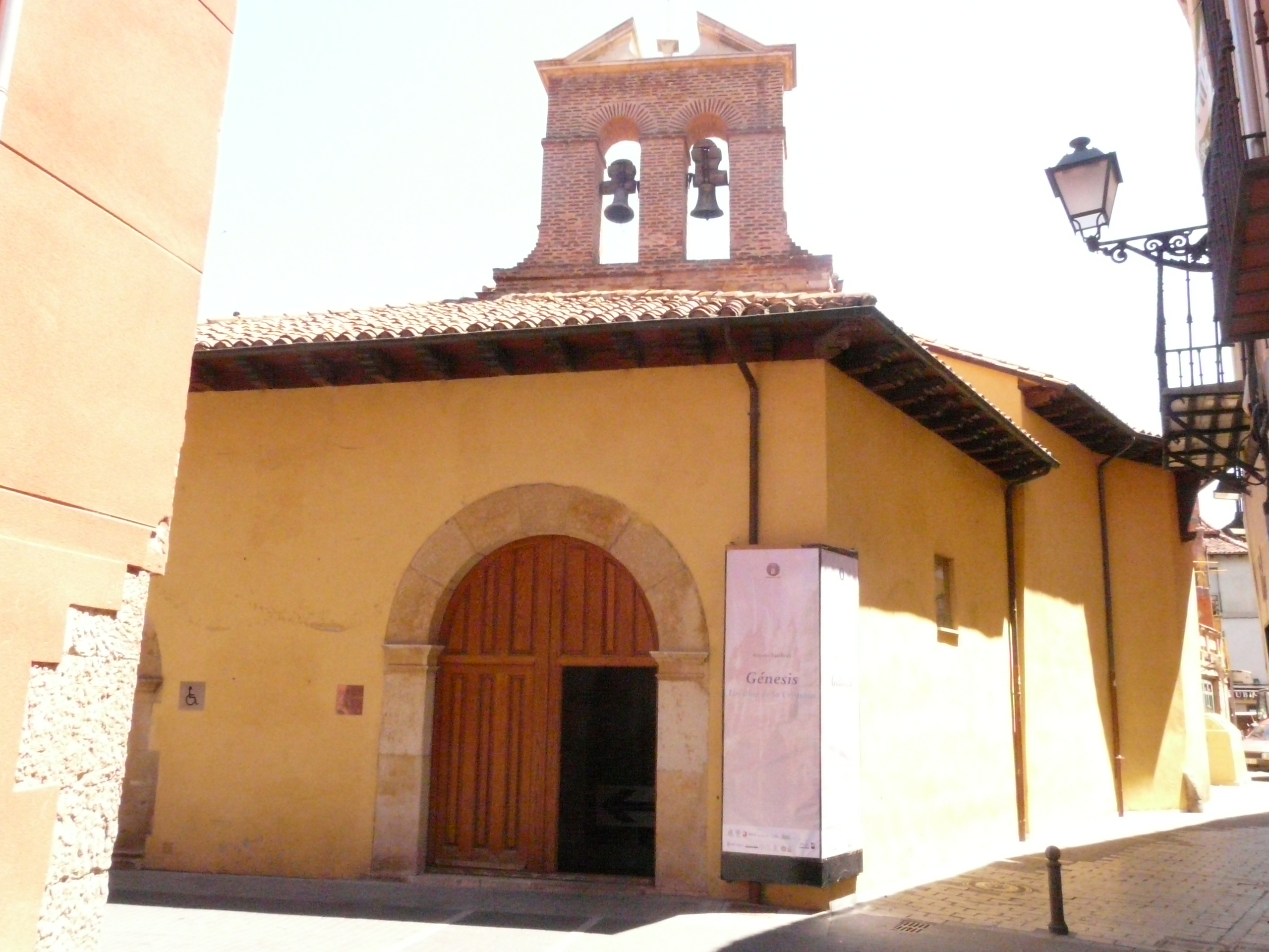 Iglesia de Palat del Rey